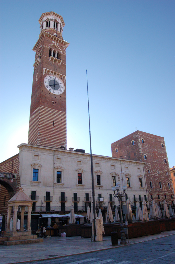 Fotografia del palazzo del Comune a Verona